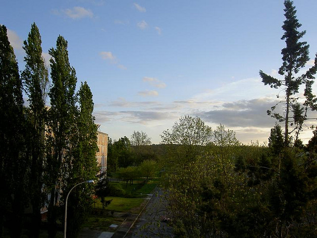 Photo de la résidence Hélène Boucher depuis la résidence Clément Ader, école nationale de l'aviation civile.